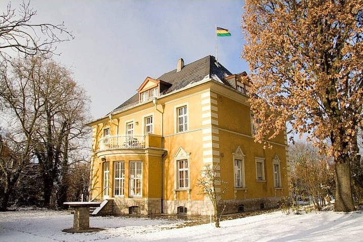 Haus und Garten der KDStV Gothia-Würzburg in der Rottendorfer Straße 26